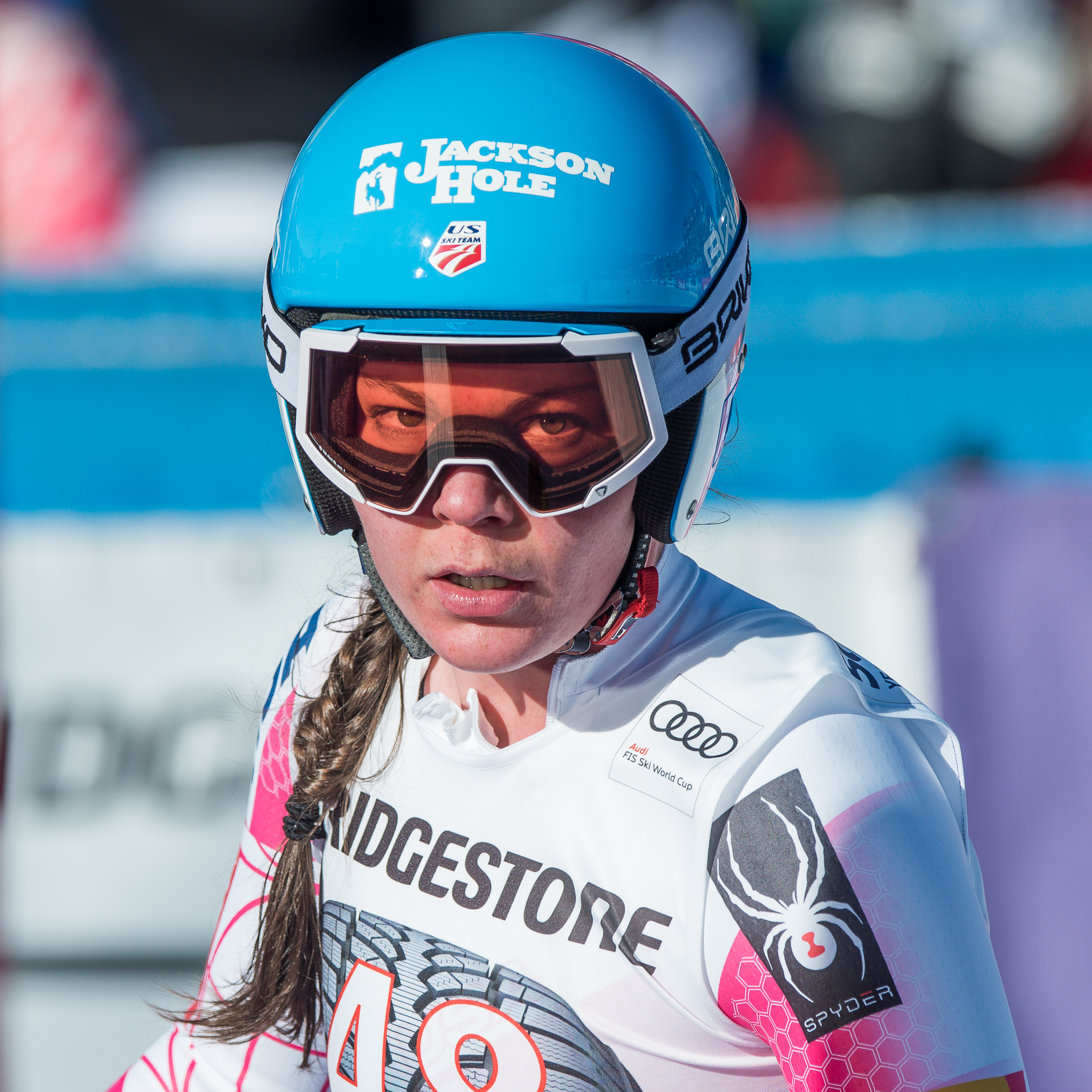 64. Kandahar Rennen,Audi FIS Ski Weltcup Garmisch-Partenkirchen,Breezy Johnson,Damen Super-G,Kandahar,Ladies Super-G